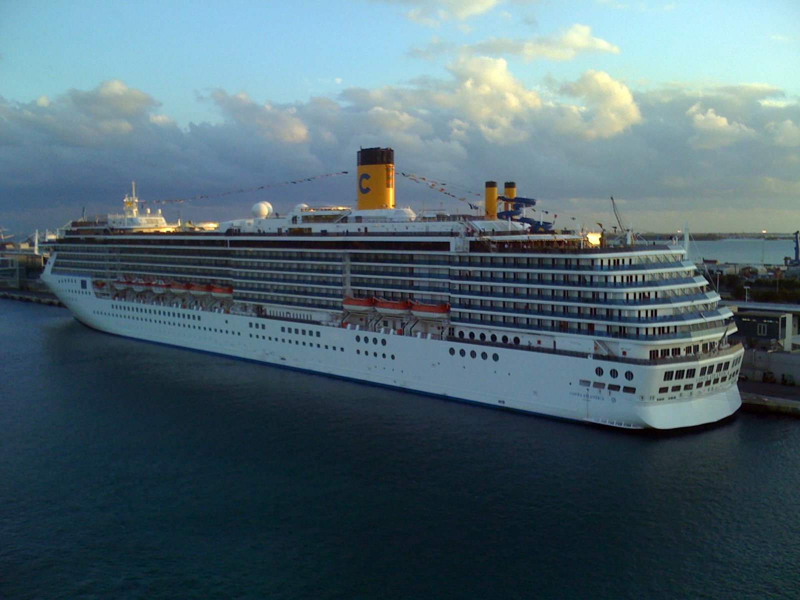 Costa Atlantica docked in Miami.